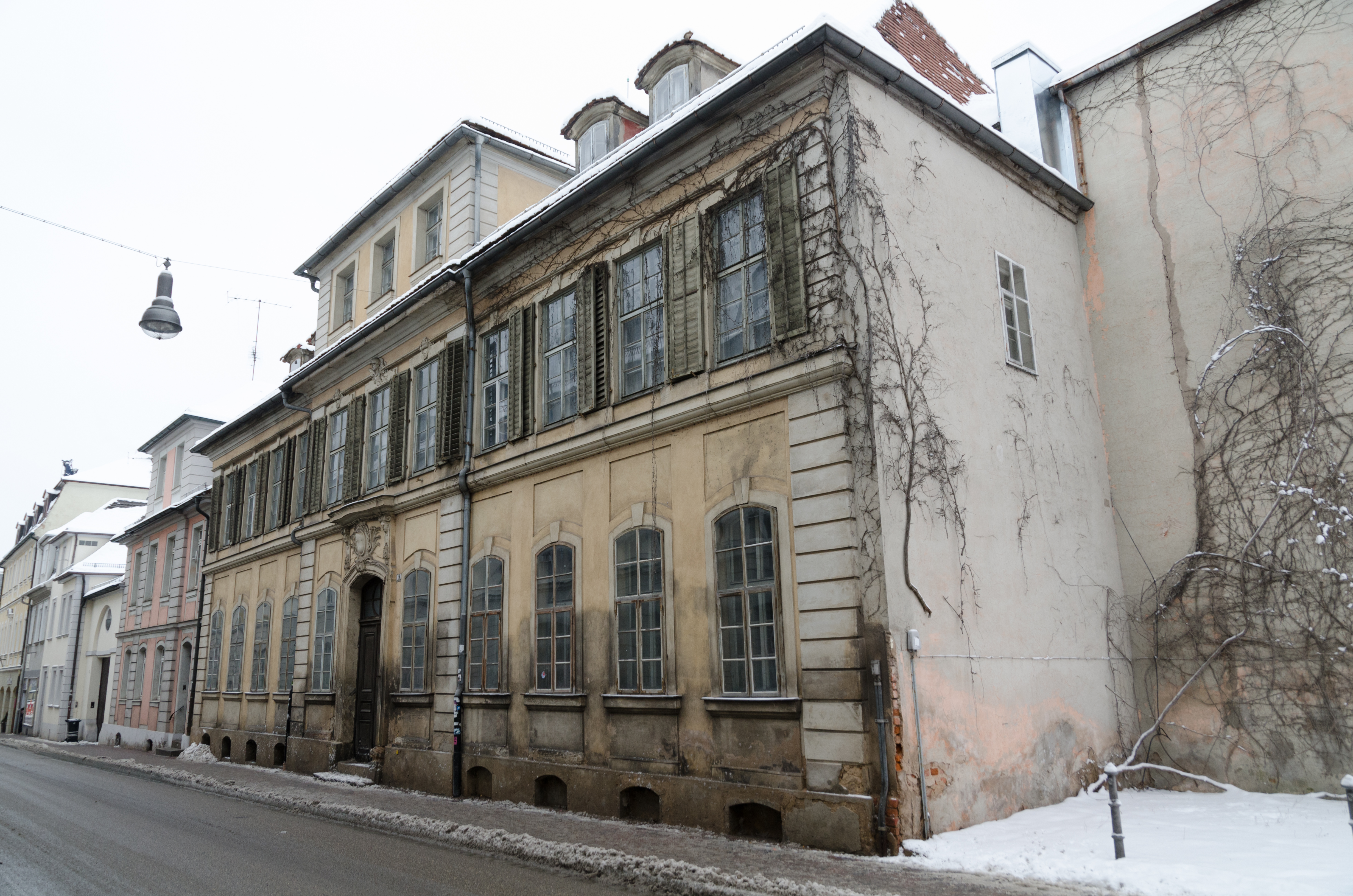 Ansbach, Bischof-Meiser-Straße 9